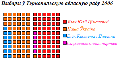 Колькасьць дэпутацкіх мандатаў у Тэрнопальскай абласной радзе паводле вынікаў выбараў 2006 году Блёк Юліі Цімашэнкі «Наша Ўкраіна» Блёк Кастэнкі і Плюшча Сацыялістычная партыя